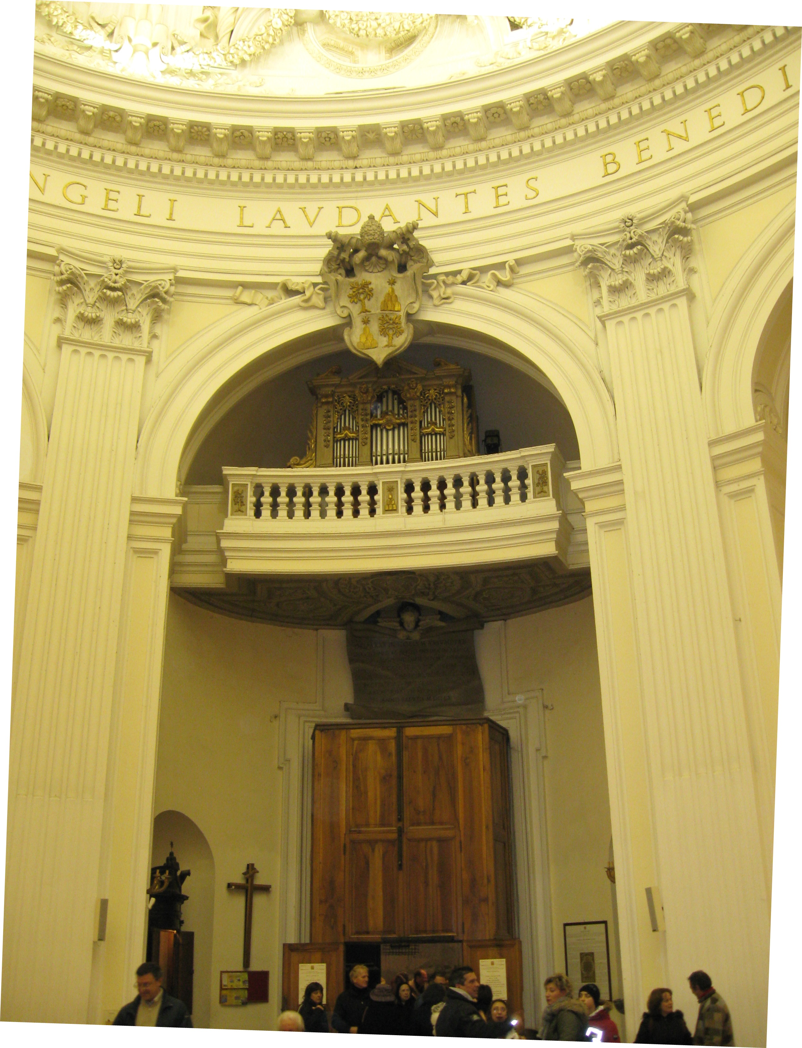 La porta principale della Collegiata di Santa Maria Assunta ad Ariccia (RM)